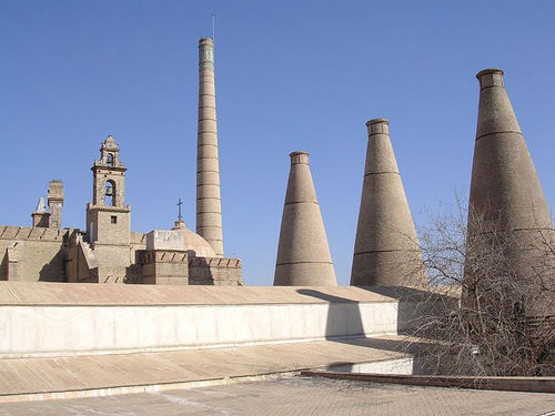 Monasterio de Santa María de las Cuevas (La Cartuja de Sevilla). Chimeneas. Foto realizada y propiedad de Stark!